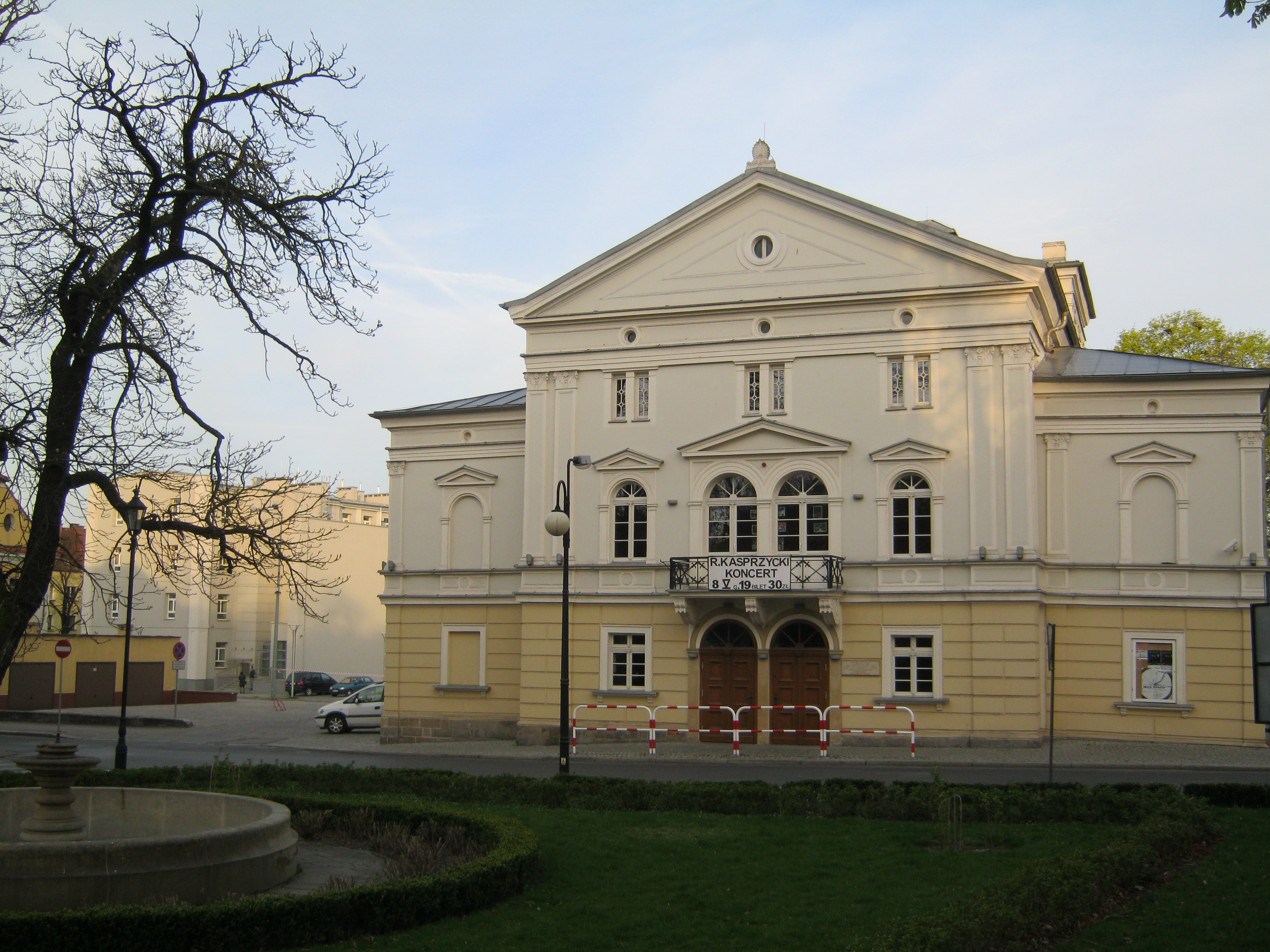 Budynek teatru w Bolesławcu.